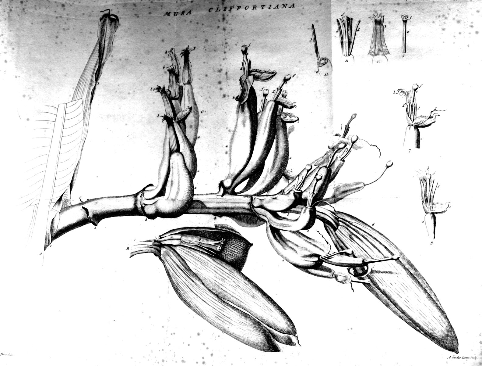 Tafel mit der Abbildung der Details der Banane (Musa) in Carl von Linnés Musa Cliffortiana, 1. Auflage, 1736